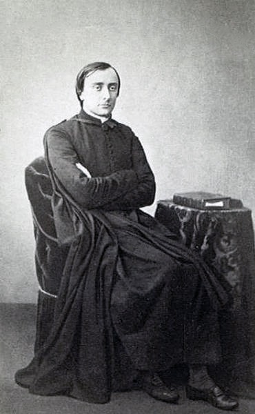 Le cardinal Lucien Bonaparte.